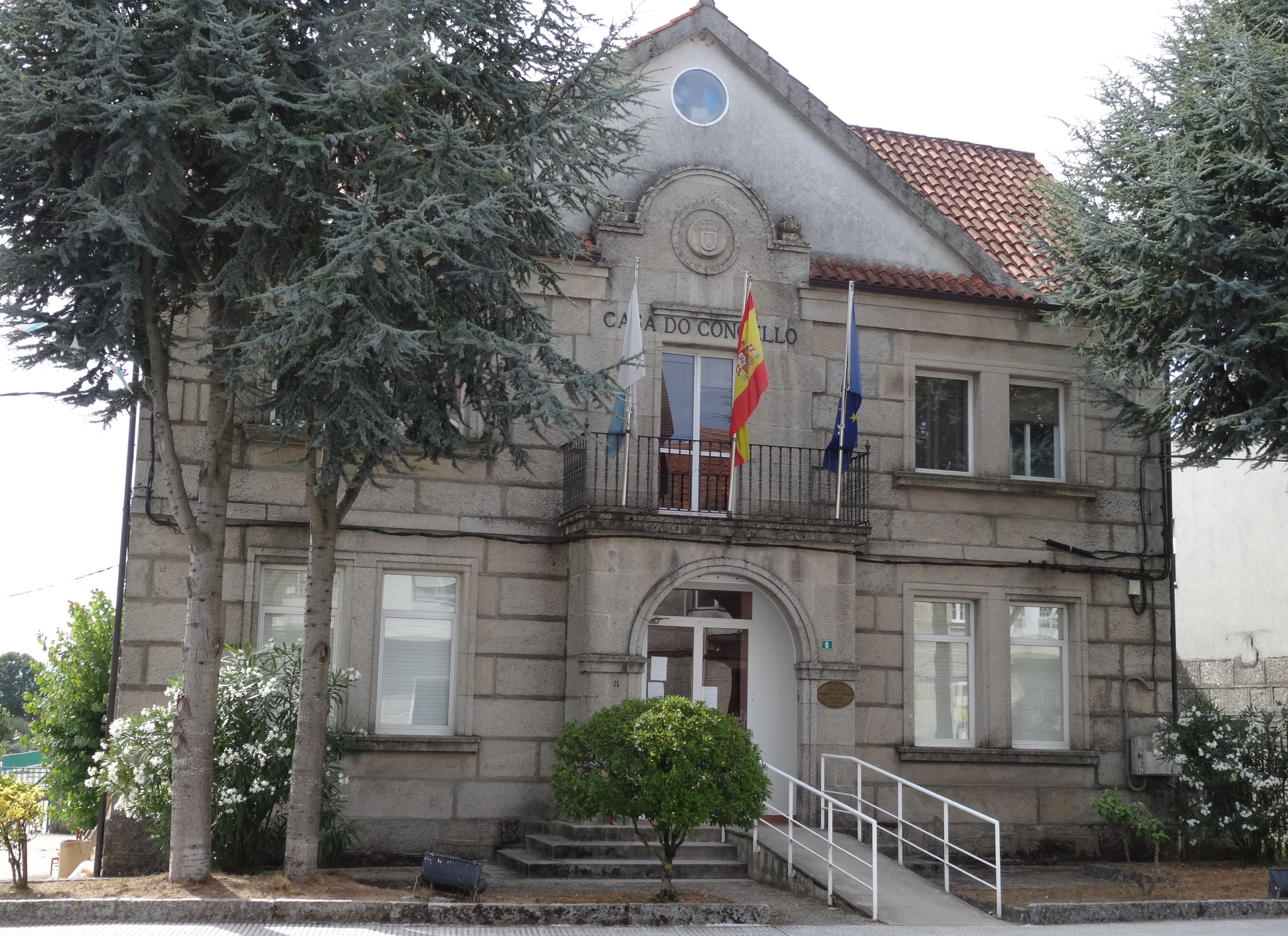 Casa do concello de Cualedro.